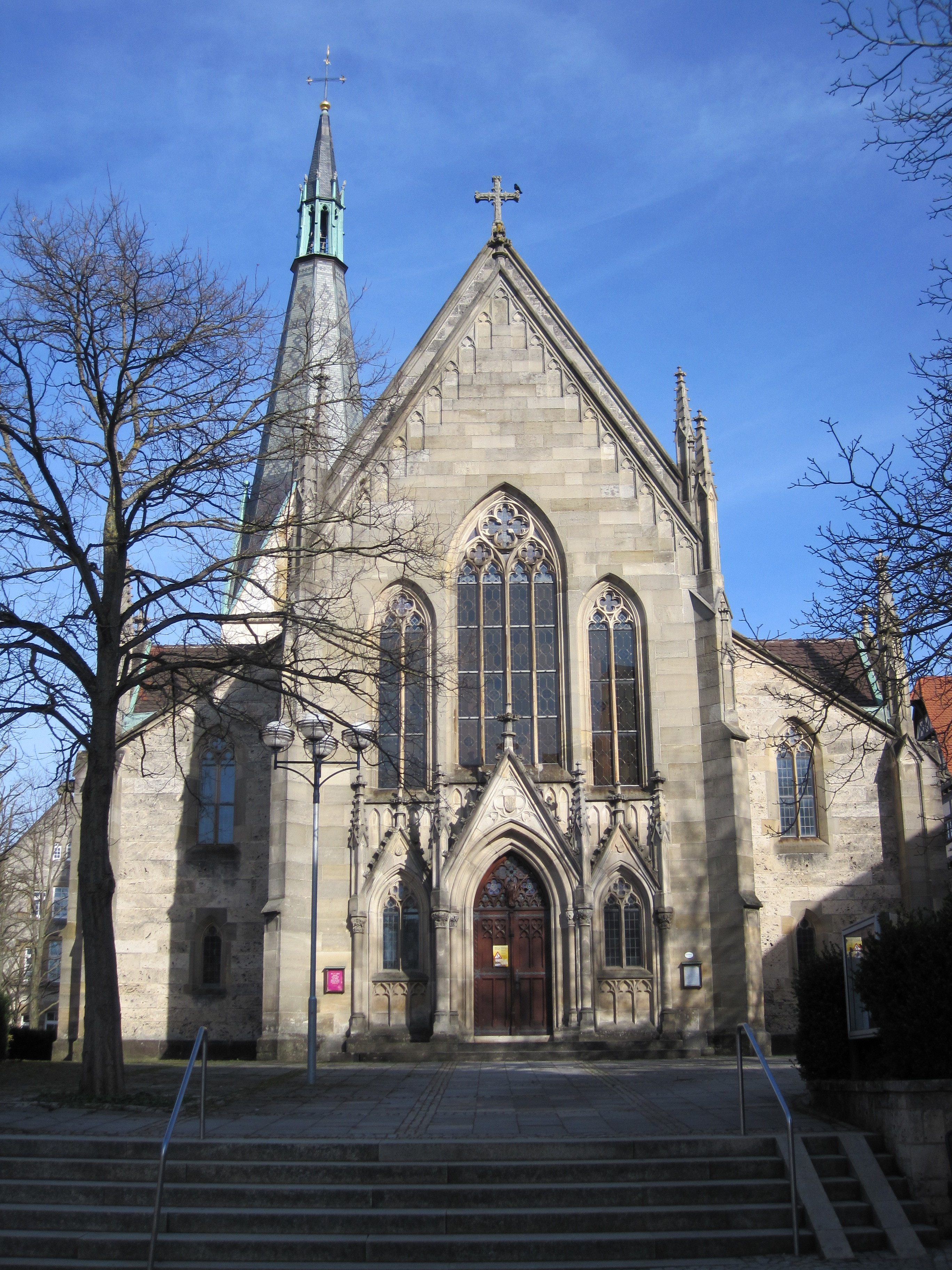 Die Stiftskirche in Dettingen an der Erms. Der Chor der Kirche geht auf Graf Eberhard V zurück.